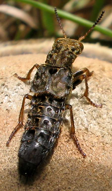 Description: Ontholestes tesselatus - aus der Fam. d. Kurzflügler Source: selbst fotografiert Date: 25. Aug. '05 Photographer: Michael Gasperl (Migas) Location: AUT/Stmk/Tauplitz